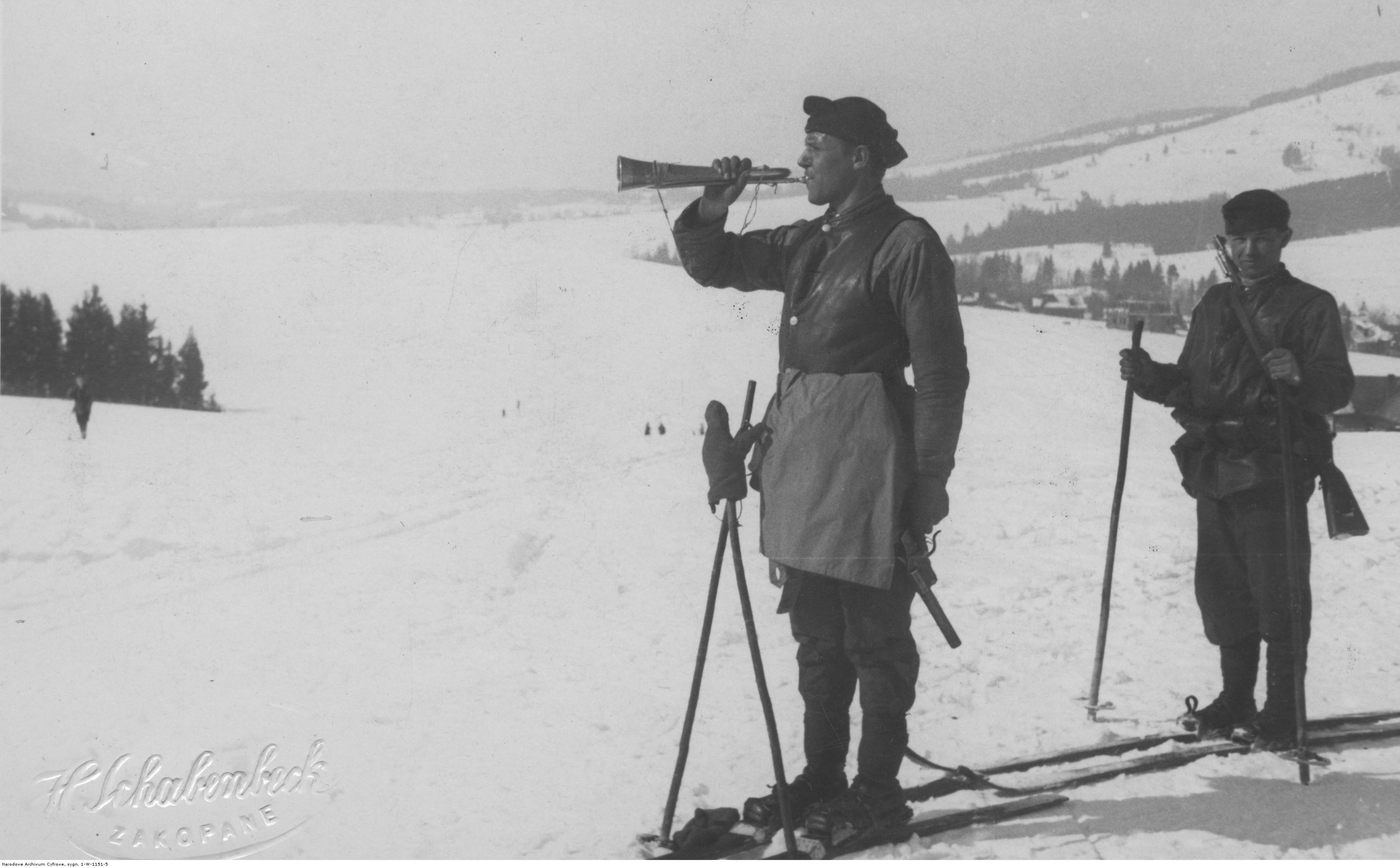 Szkoła wysokogórska przy 21 Dywizji Piechoty Górskiej w Zakopanem. Dawanie trąbką sygnału zakończenia ćwiczeń. Koncern Ilustrowany Kurier Codzienny - Archiwum Ilustracji. Sygnatura: 1-W-1151-5